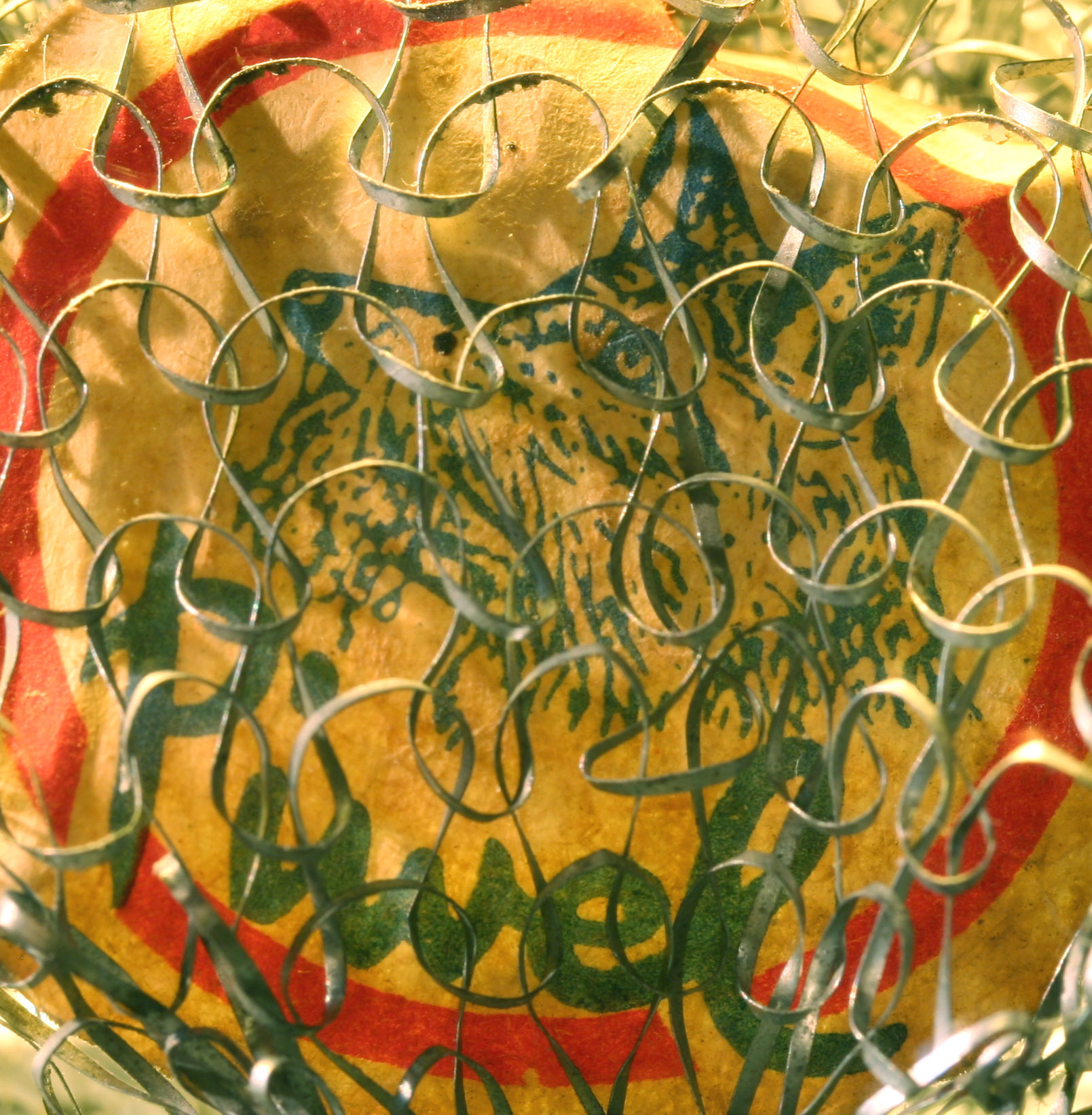 Agewieften Etikett.